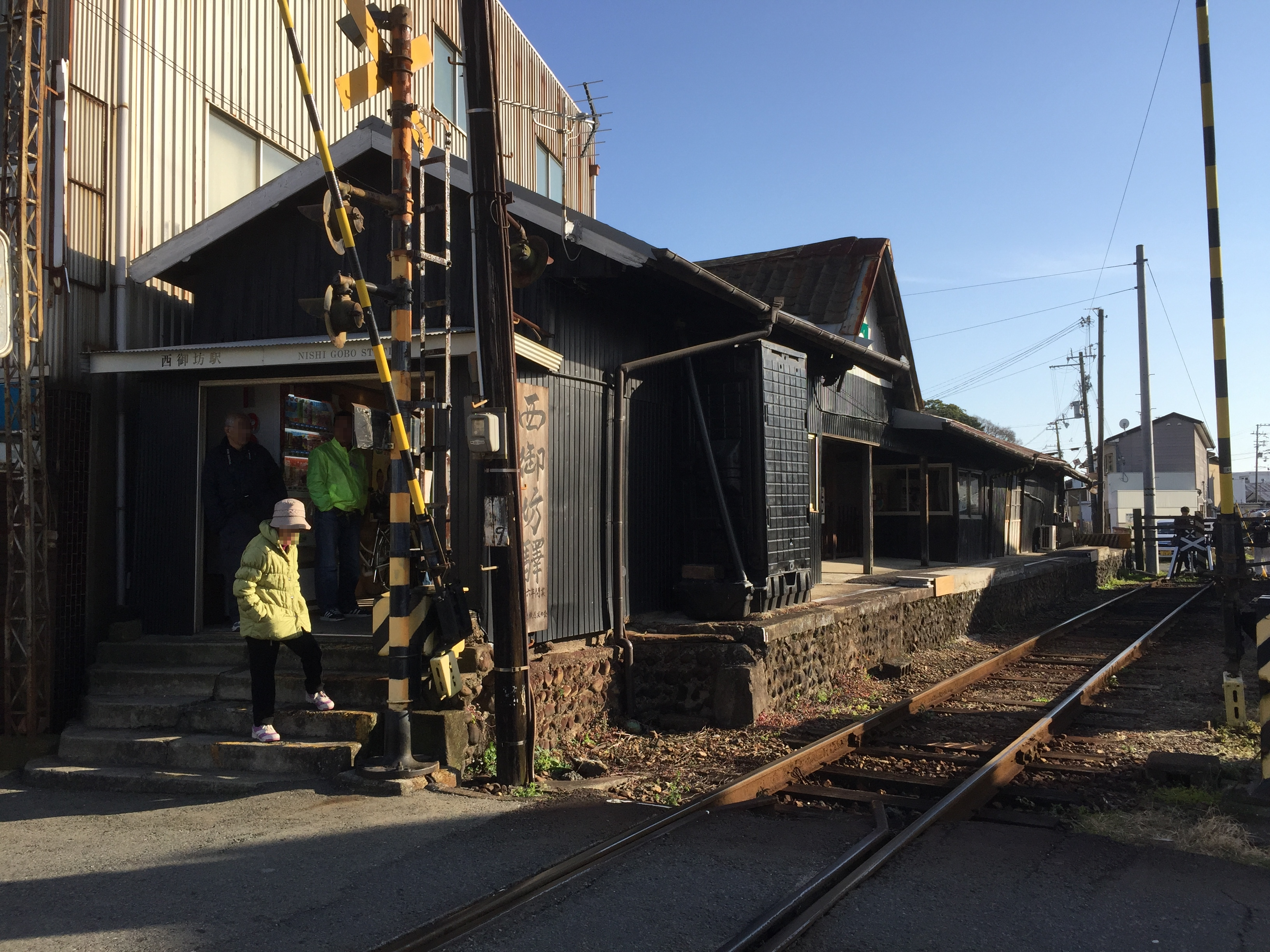 西御坊駅 駅舎